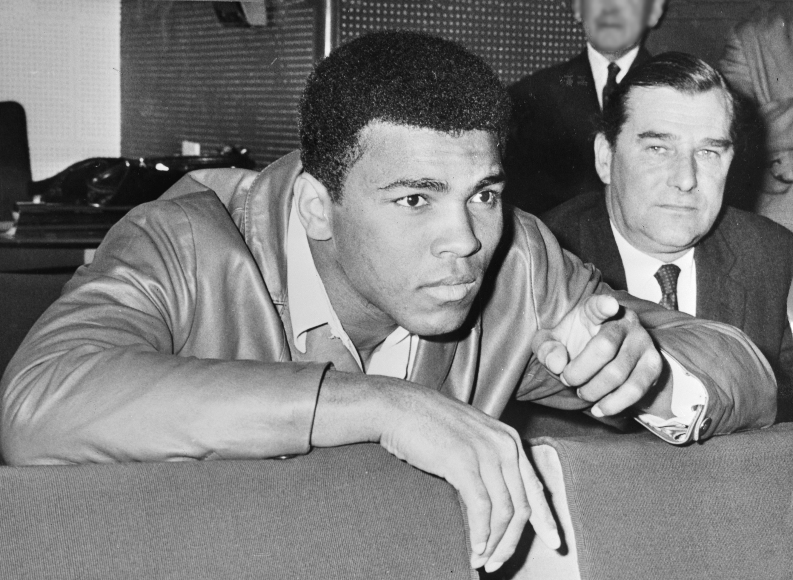 Muhammad Ali